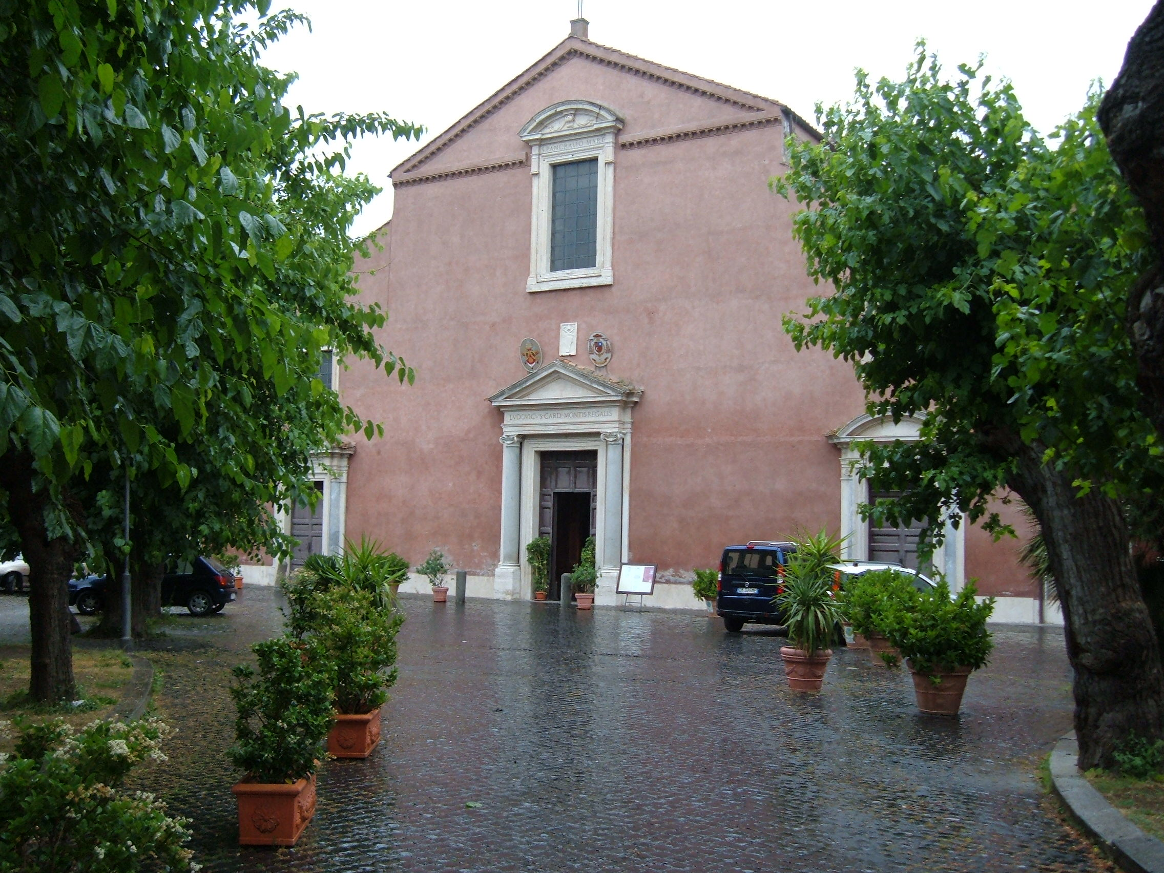 Chiesa di San Pancrazio, a Roma, nel quartiere Gianicolense.